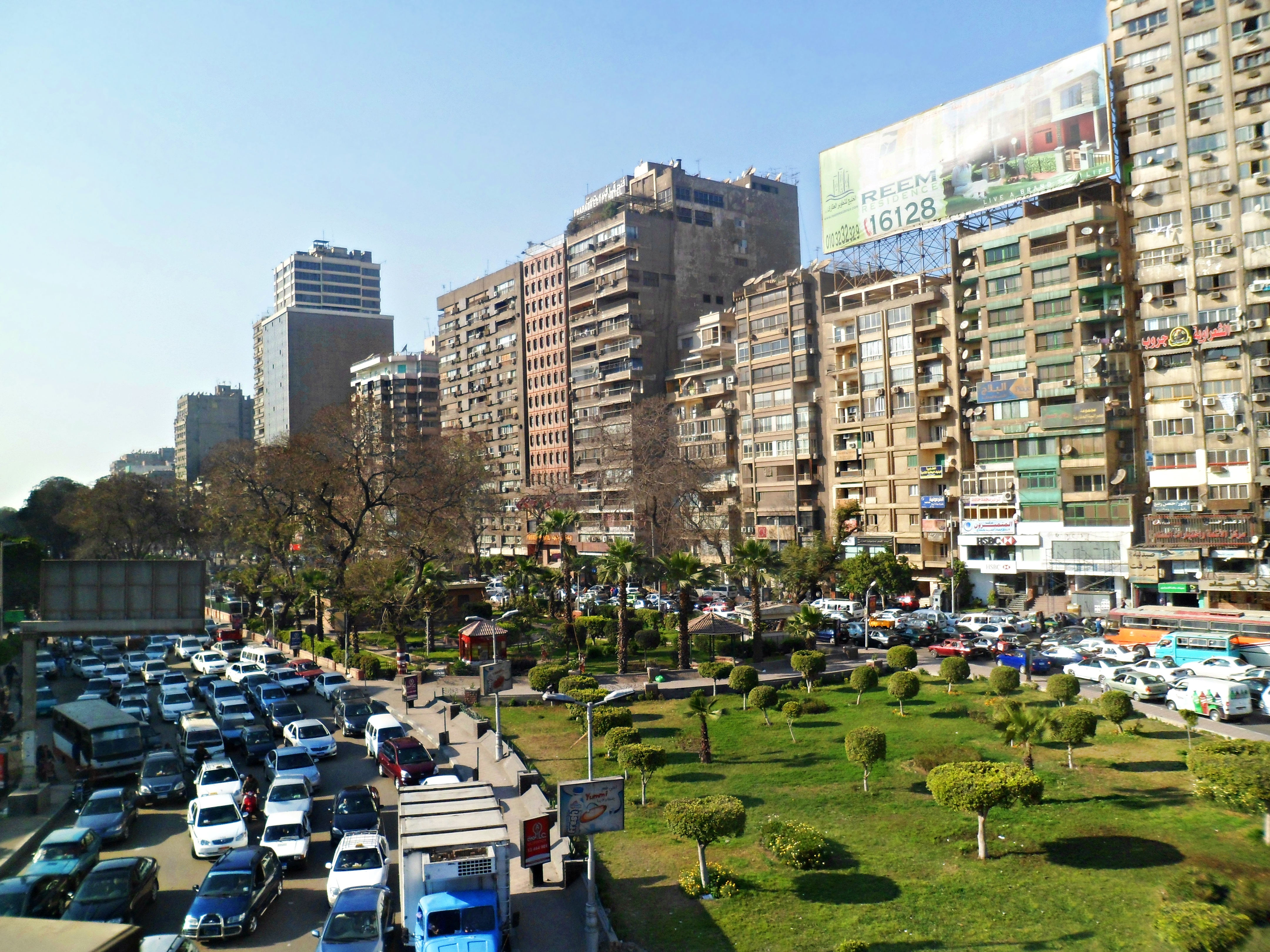 الزحام في مدينة الجيزة، مصر.